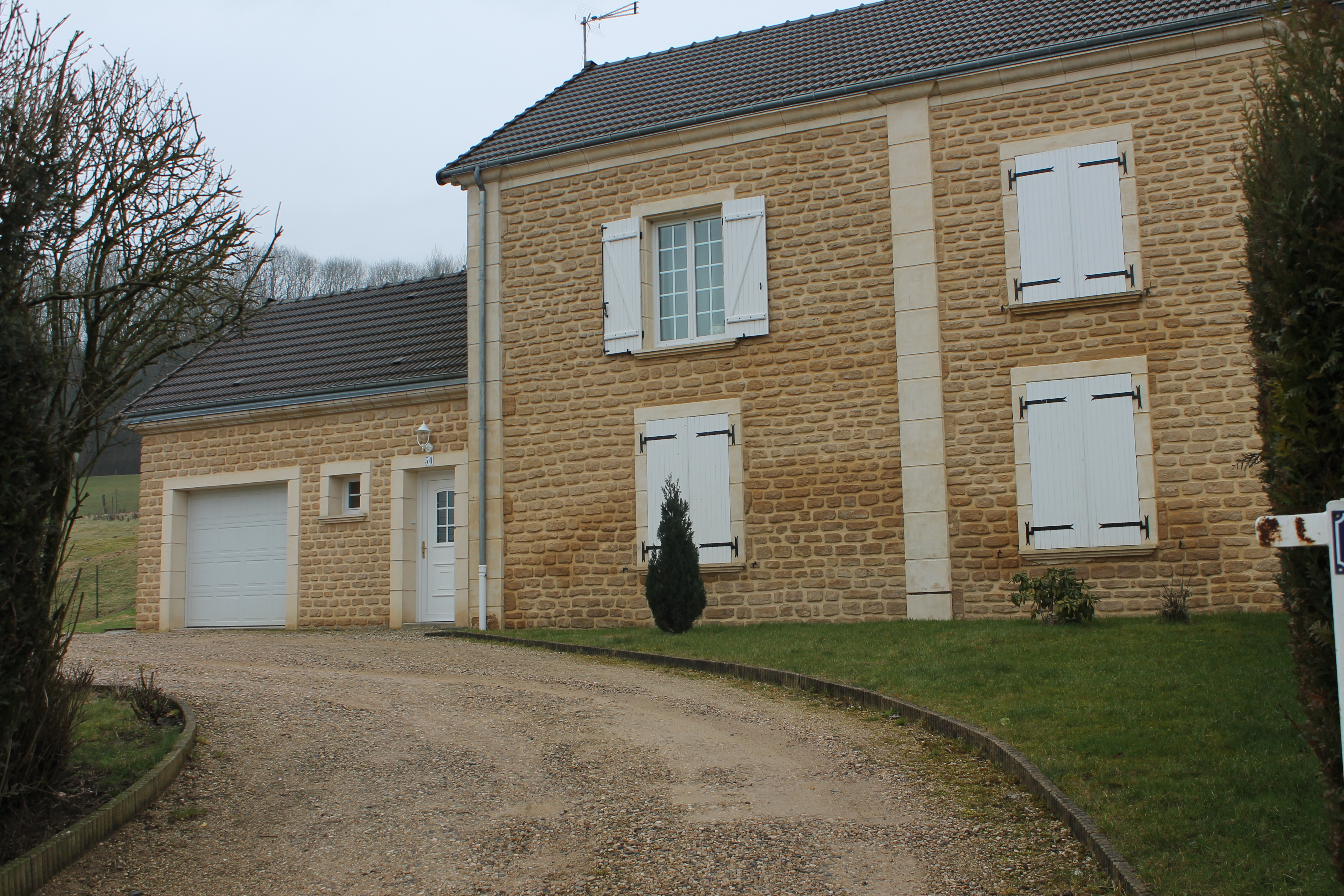 Maison du tisserand, à Donchery: lieu de la rencontre entre Napoléon III et Bismark, le 2 septembre 1870.